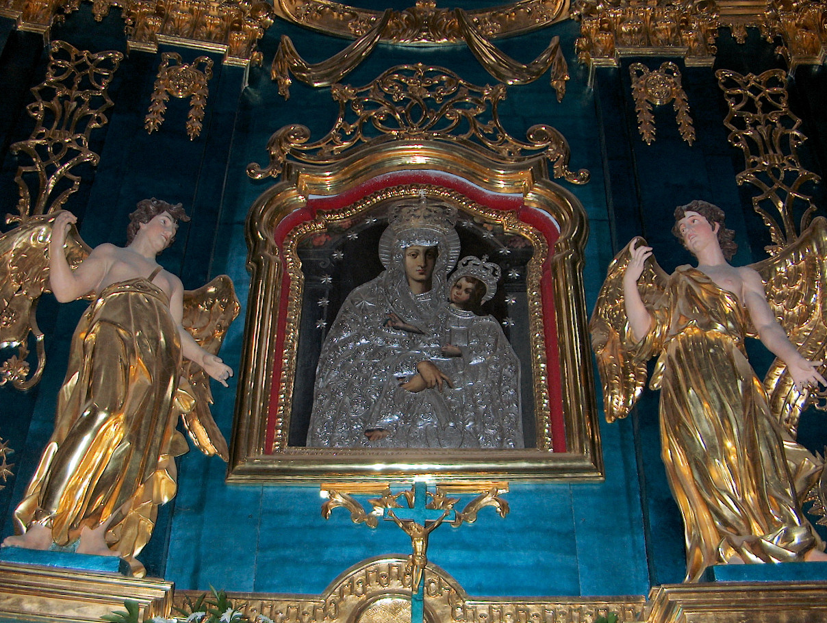 Foto by Anna Ordyczynska. Ołtarz Matki Bożej w Kościele Św. Anny w Lubartowie.